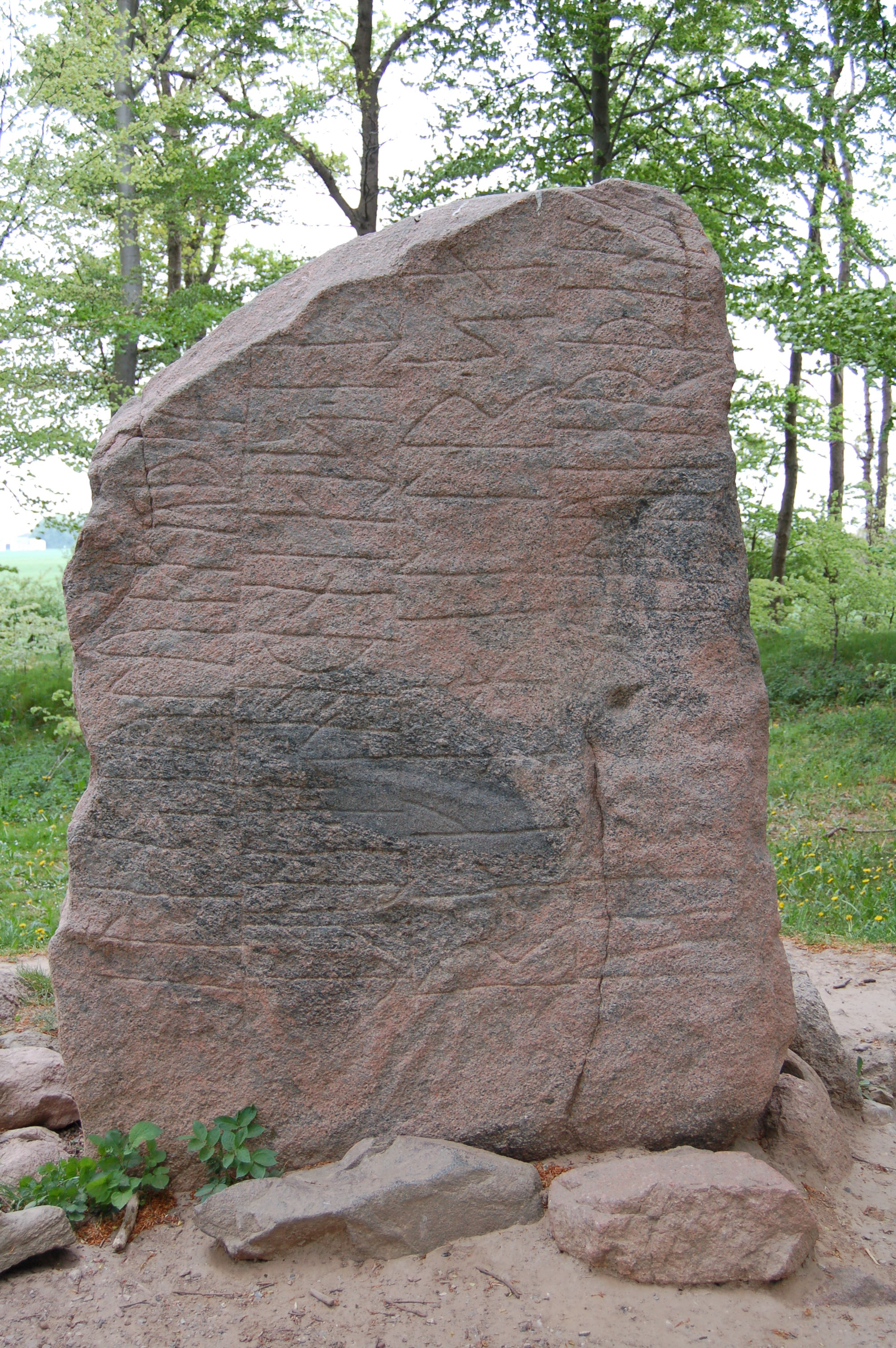 Photo of Glavendrup stone, a runestone from Funen, Denmark